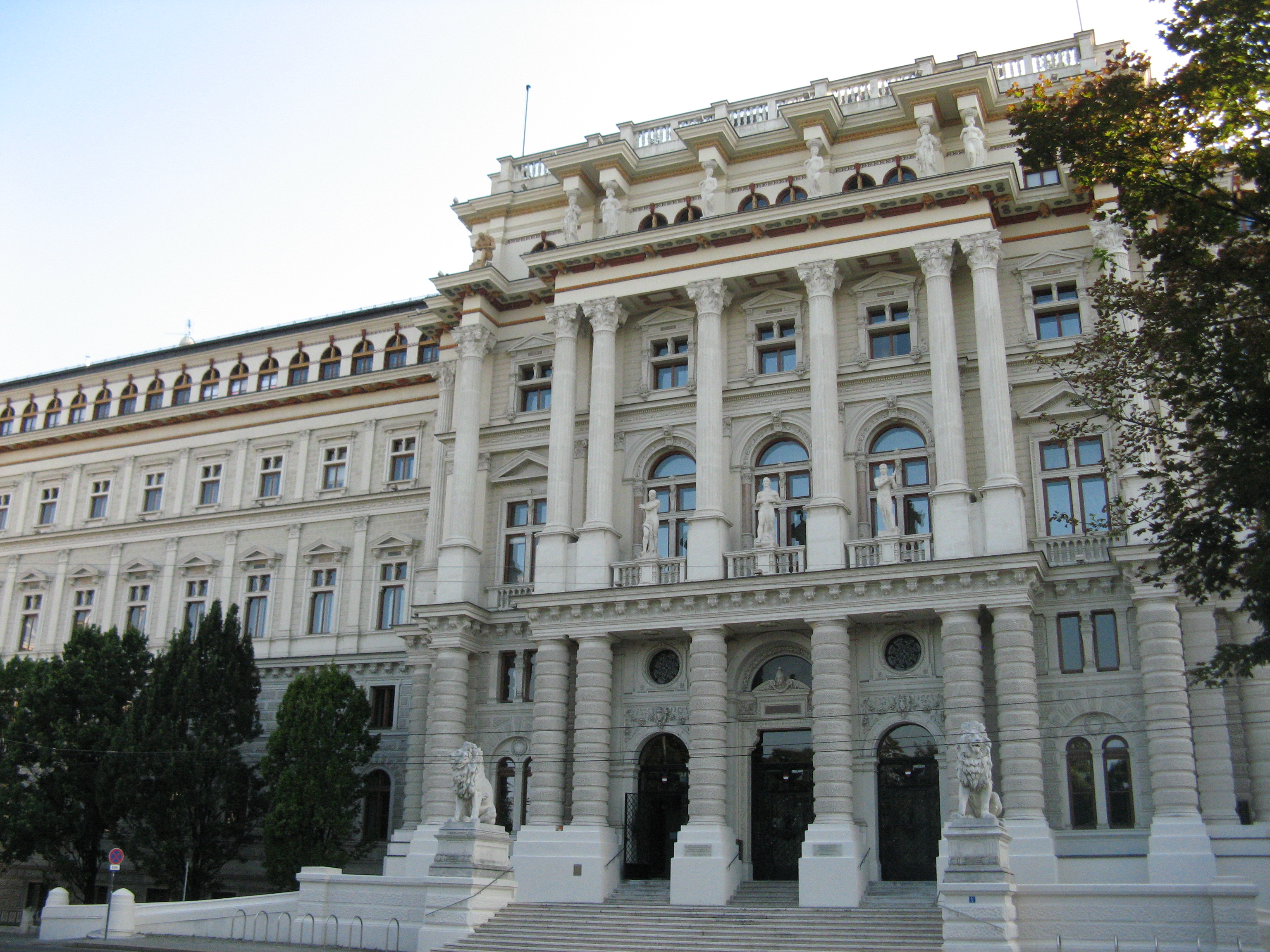 Justizpalast (1875-81) von Alexander Wielemans, Schmerlingplatz, Wien-Innere Stadt